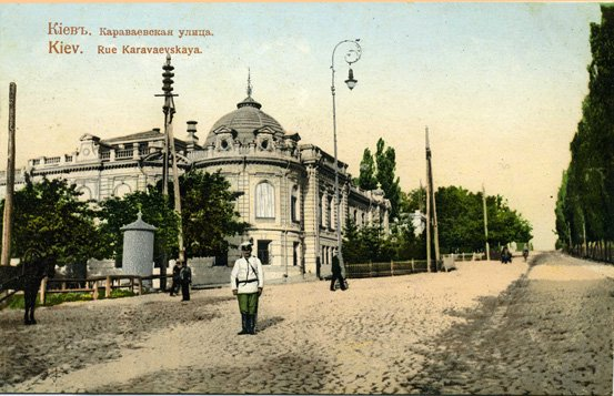 Перекресток Караваевской и Кузнечной улиц в Киеве